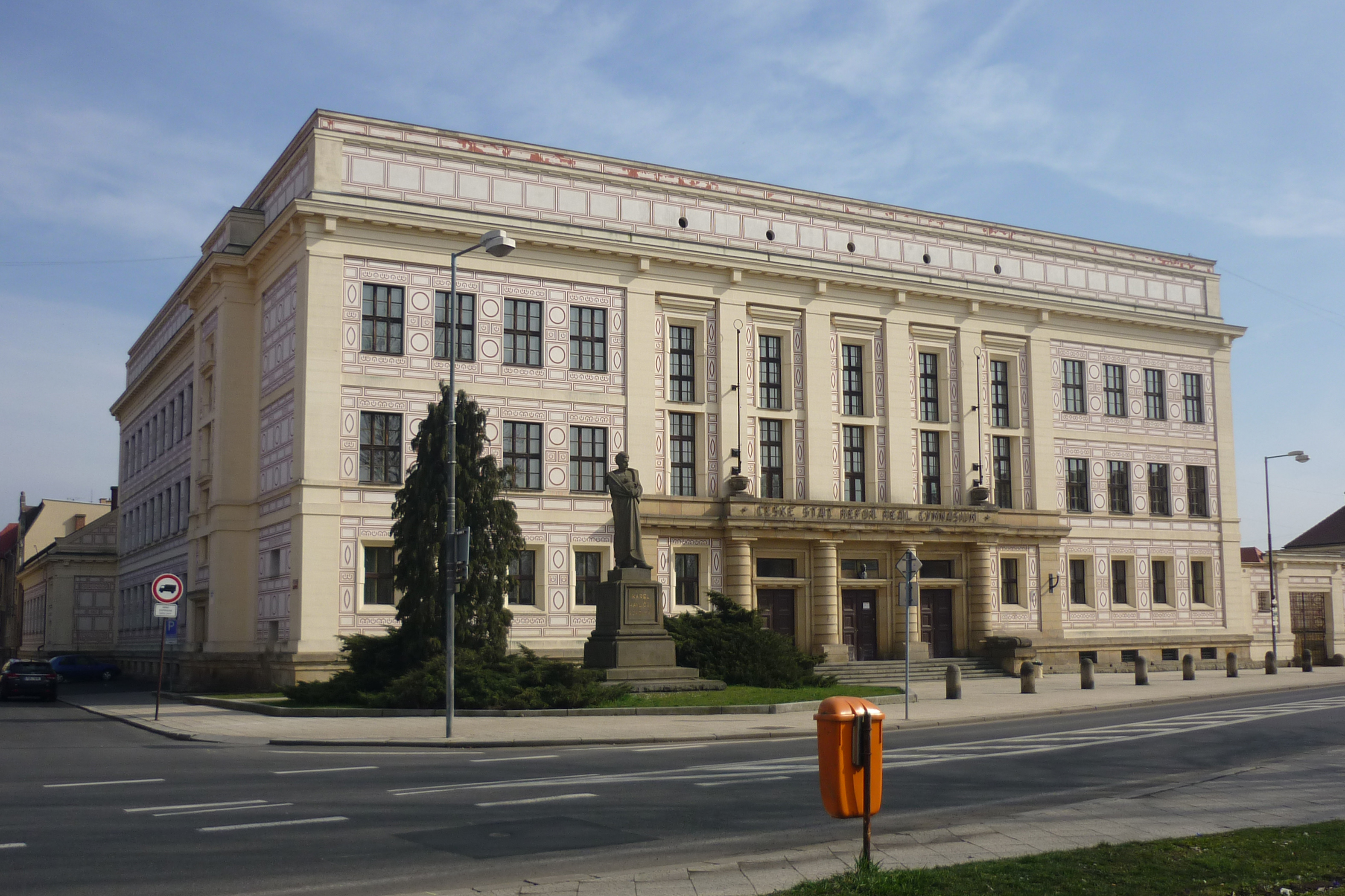 Reform-Gymnasium in Dux (Duchcov)